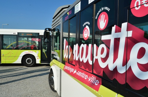 navette